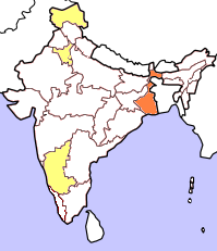 Kartan bygger på resultatet från valet till Lok Sabha april/maj 2004. Gult betyder att partiet lanserat en eller flera kandidater i delstaten, dock utan att vinna mandat. Orange betyder att partiet vunnit mandat från delstaten. Rött betyder att partiet vunnit minst 25% av mandaten från den delstaten och mörkrött 50% eller mer. Kartan tar inte hänsyn till avhopp, partifusioner och fyllnadsval under den ordinarie mandatperiodens gång.